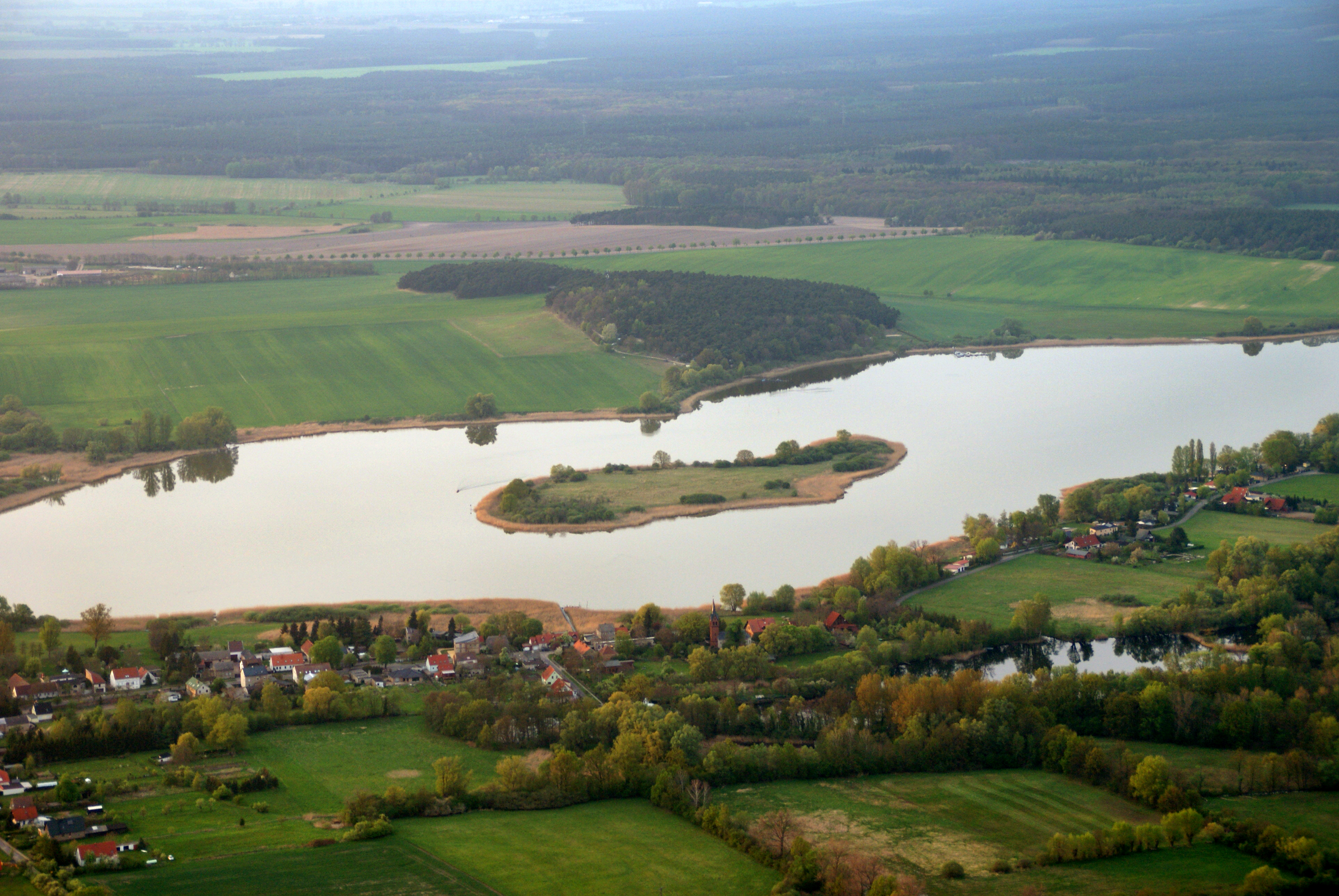 Dorf Lünow (Gemeinde Roskow, vorne) und Naturschutzgebiet „Möweninsel Buhnenwerder“ im Beetzsee (Stadt Brandenburg an der Havel)